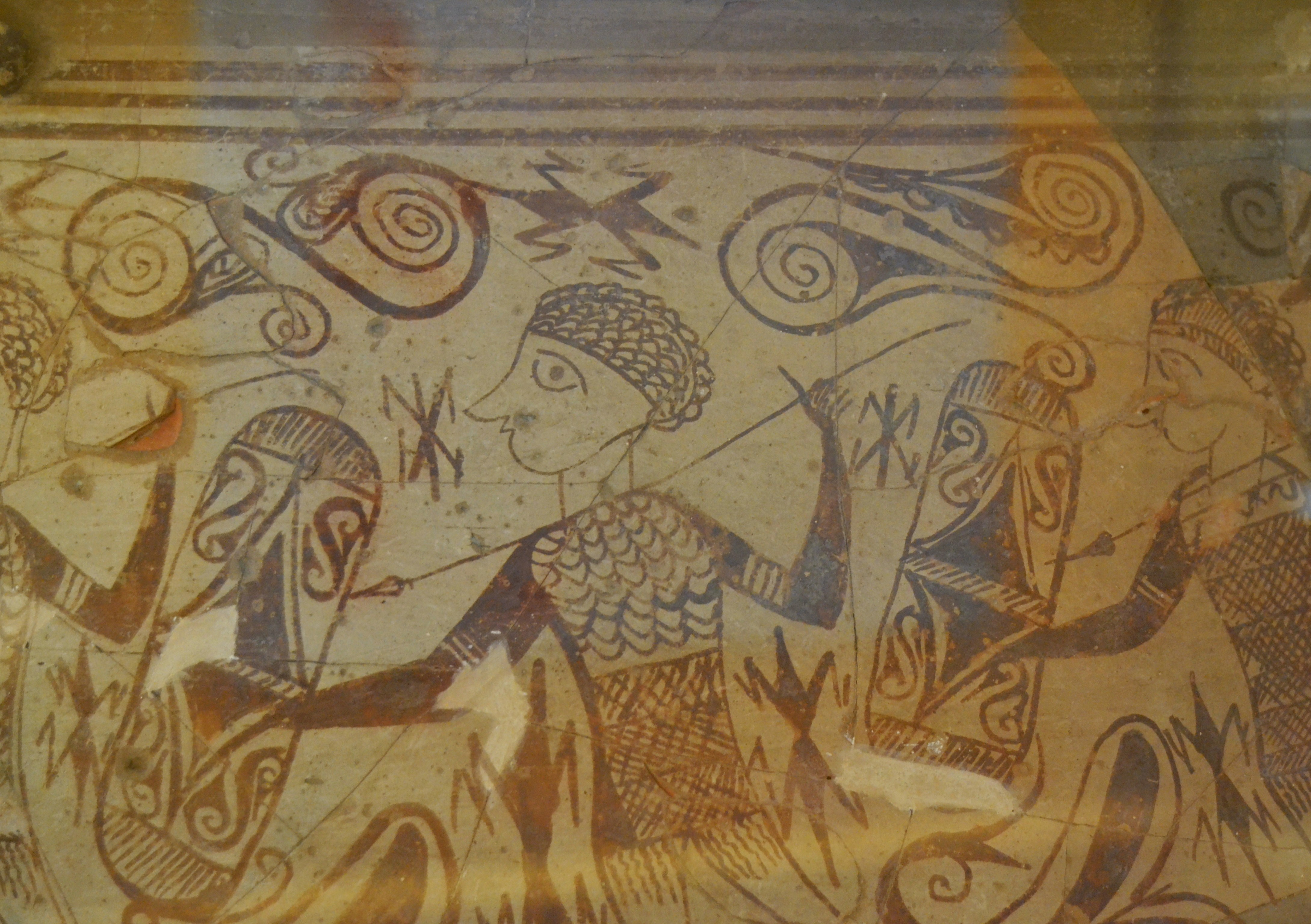 Detall del vas dels guerrers, Edeta - Tossal de sant Miquel (Llíria), segles III - II aC. Museu de Prehistòria de València.